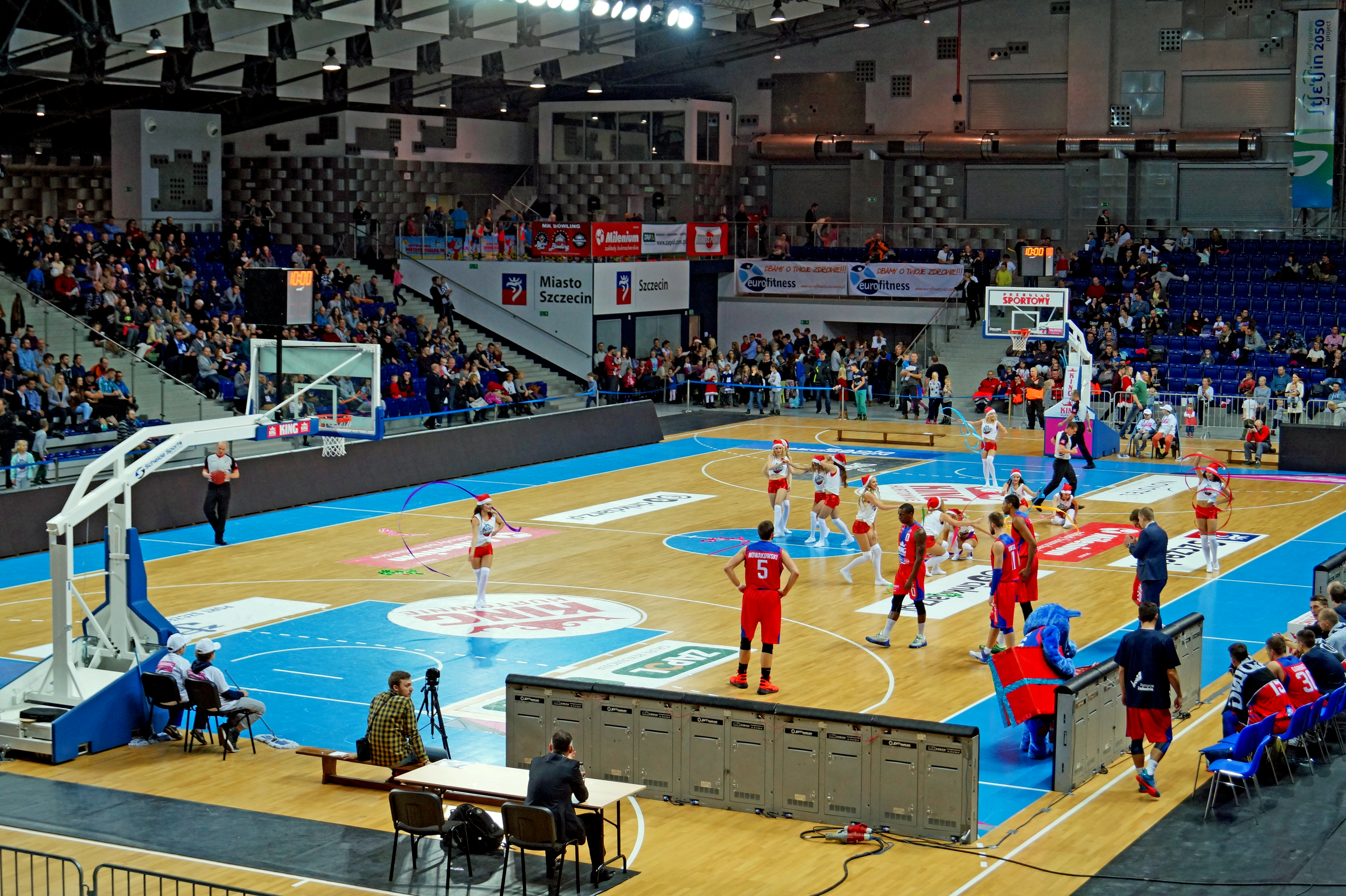 9 kolejka, sezonu 2015/16, mecz King Wilki Morskie Szczecin vs BM Slam Stal Ostrów Wielkopolski (na boisku "Tańczące z Wilkami" cheerleaderki Wilków Morskich), Arena Szczecin (Azoty Arena) w Szczecine, Polska